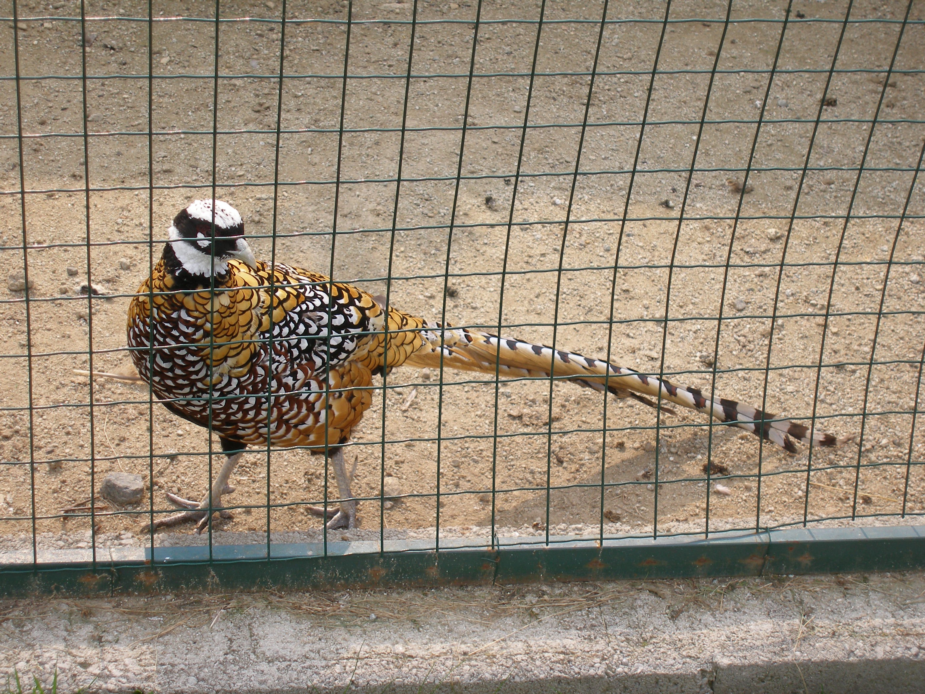 Okolie osady Gerlachov